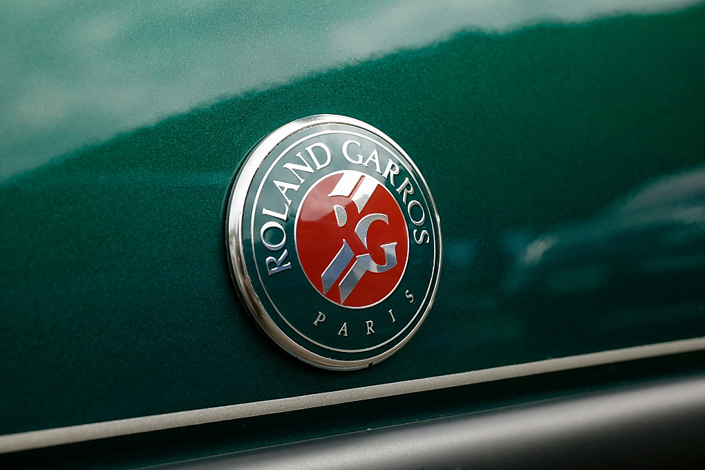 Peugeot 306 Roland Garros